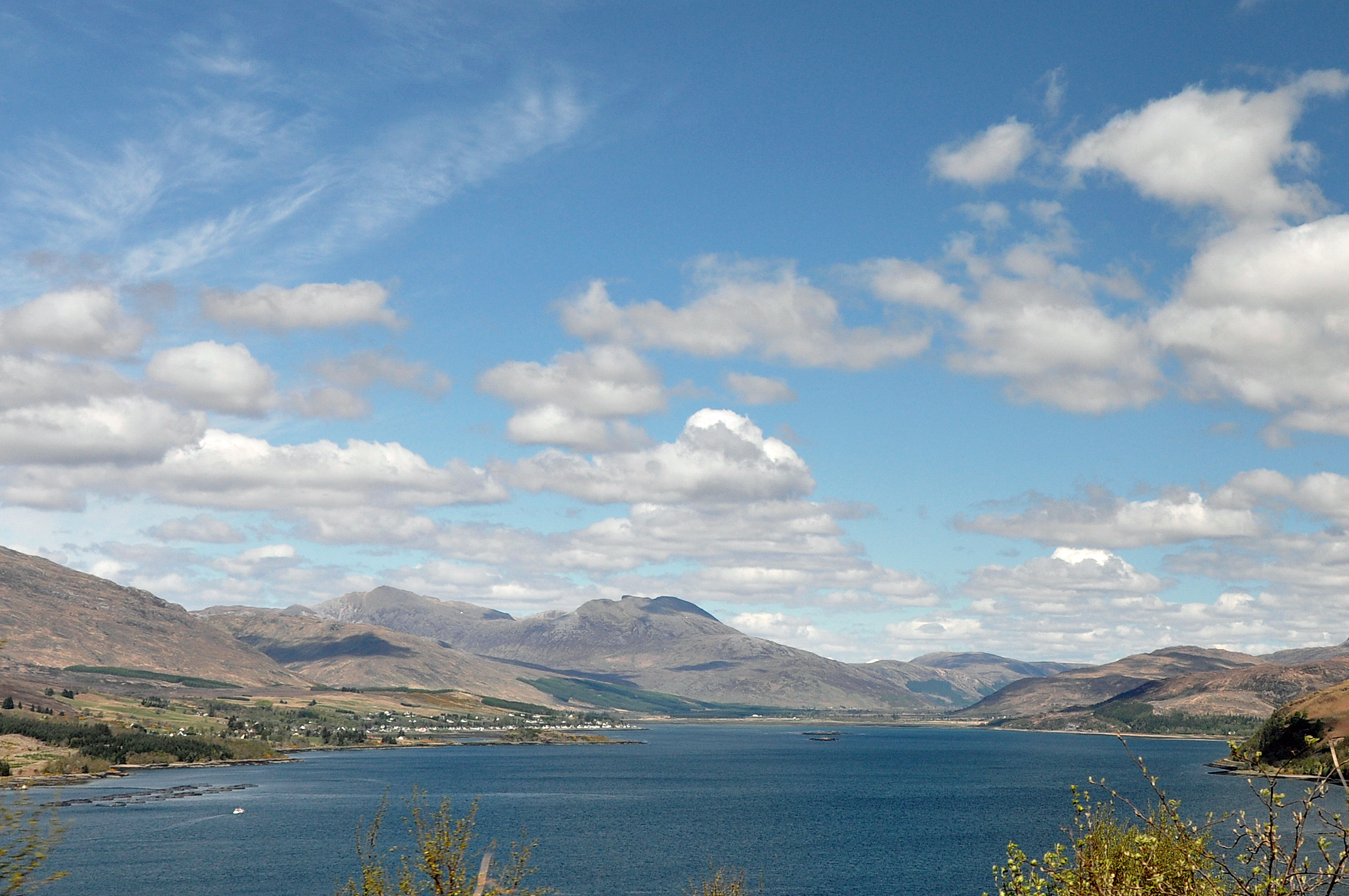 Loch Carron en Lochcarron, Highland, Schotland